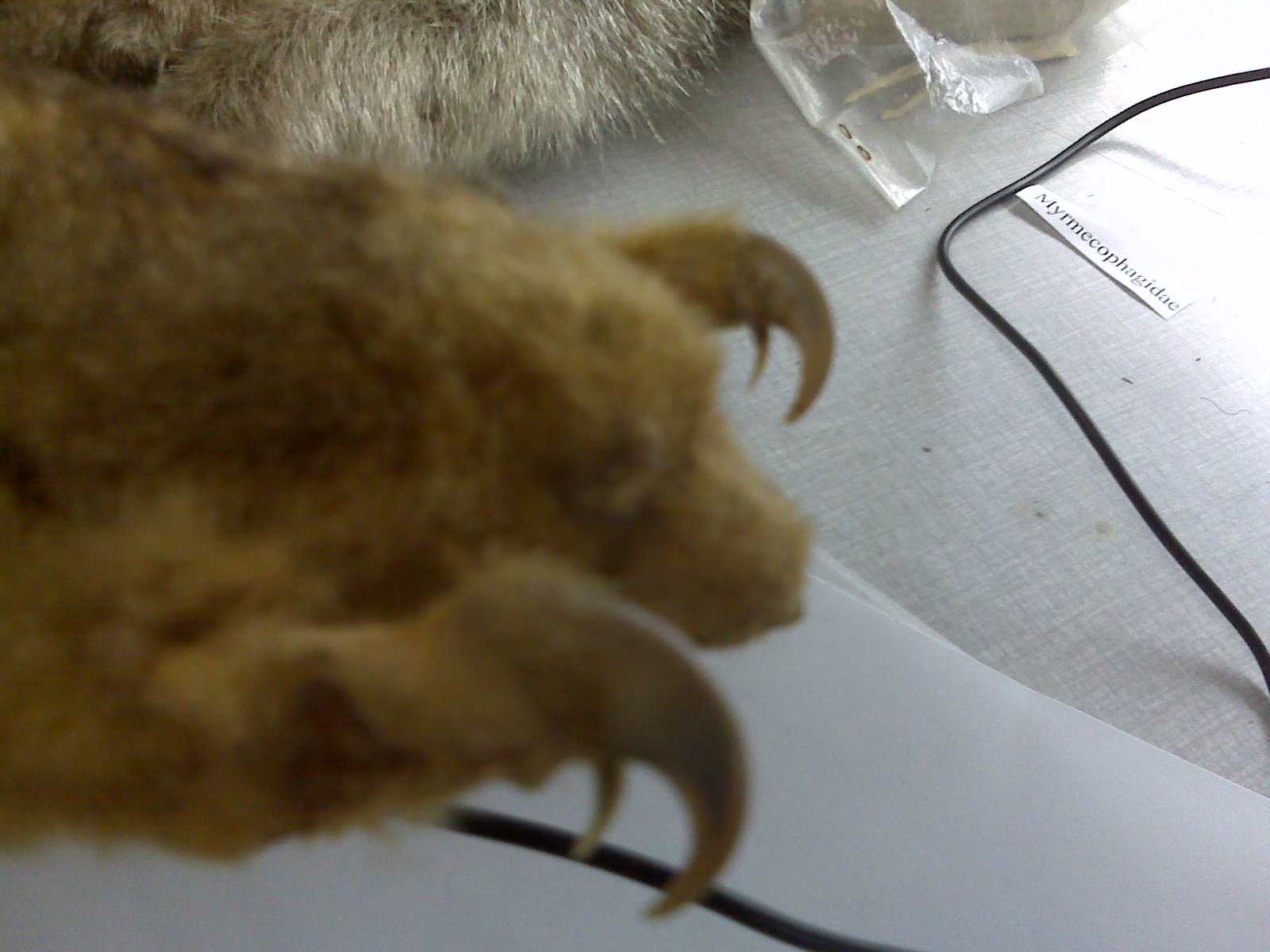 Espécimen de Cyclopes didactylus